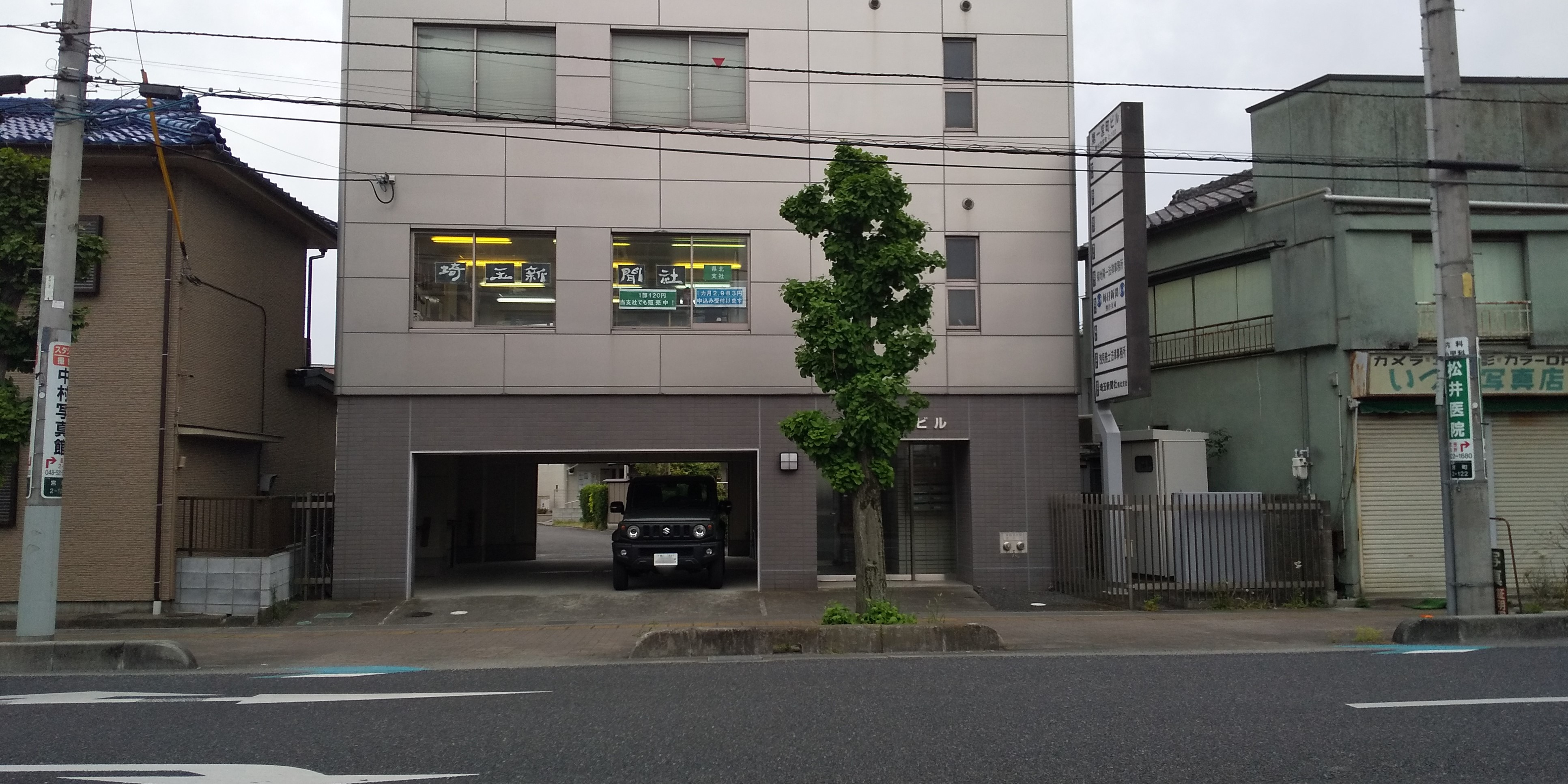 埼玉新聞社県北支社（埼玉県熊谷市）